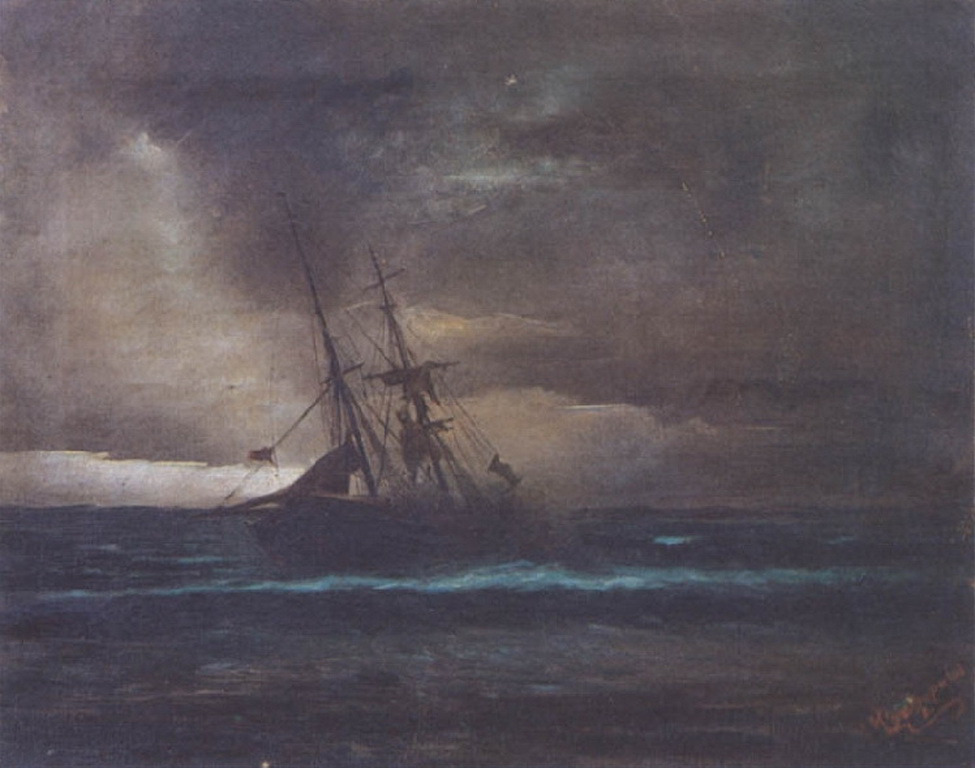 Seascape